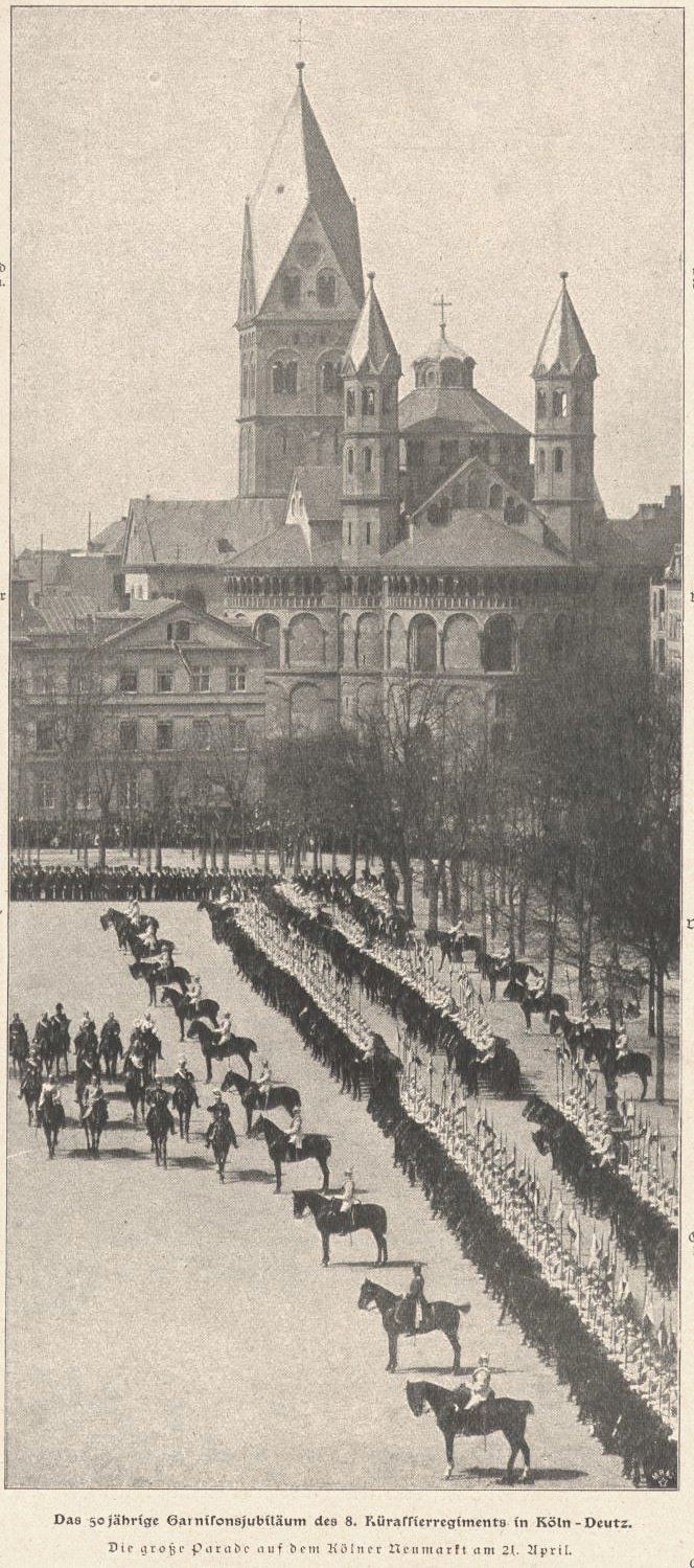 Parade des 8. Rheinischen Kürrassier Regiments, Köln, Neumarkt, 21. April 1900